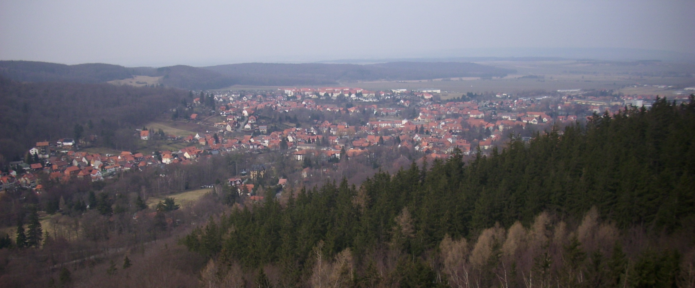 Blick über Ilsenburg